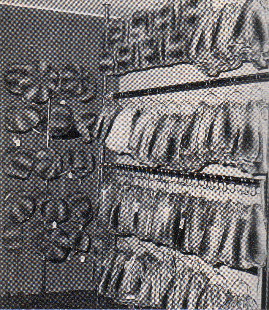 Am Lager der Firma Chinchilla Pelze Karl J. Eckert, Frankfurt am Main. Nach dem Umzug der Firma von der Taunusstraße 52/60 in die Niddastraße 57 im Februar 1975. Karl J. Eckert war eigentlich gelernter Maßschneider. Seit etwa 1964 war er in der Pelzbranche, nachdem er sich bereits seit 1958 hobbymäßig mit der Chinchillazucht befasst hatte, ein Artikel, auf den er sich spezialisiert hatte. Später gehörte er dem Dachverband Deutscher Chinchilla-Züchter an und fungierte auch als Gutachter. Nach seinen eigenen Angaben unterhielt er seinerzeit das größte Lager in der Bundesrepublik an Chinchillafellen und -konfektion.